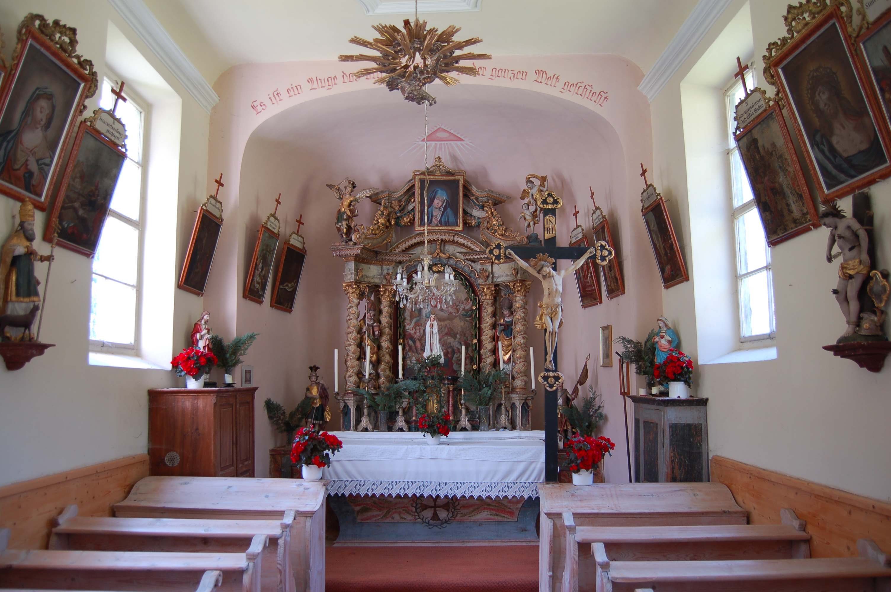 Das Innere der Kapelle der Fraktion Feld (Gemeinde Matrei in Osttirol)